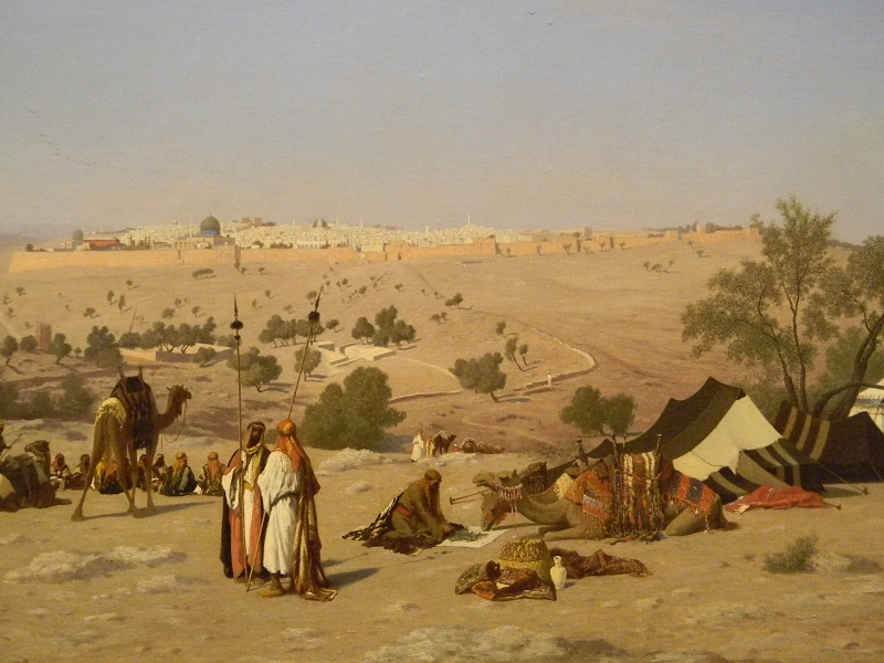 Jérusalem et ses environs („Jerusalem from the Mount of Olives“, 1880)